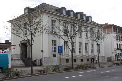 Ehem. Schulgebäude, heute Ordnungsamt, Schenkelstr. 6-8, Düren